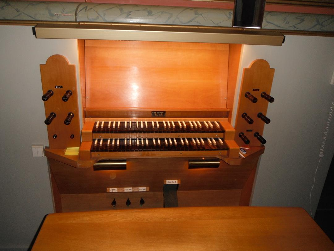 Spelbordet till Grönvallsorgeln från 1965 i Källsjö kyrka